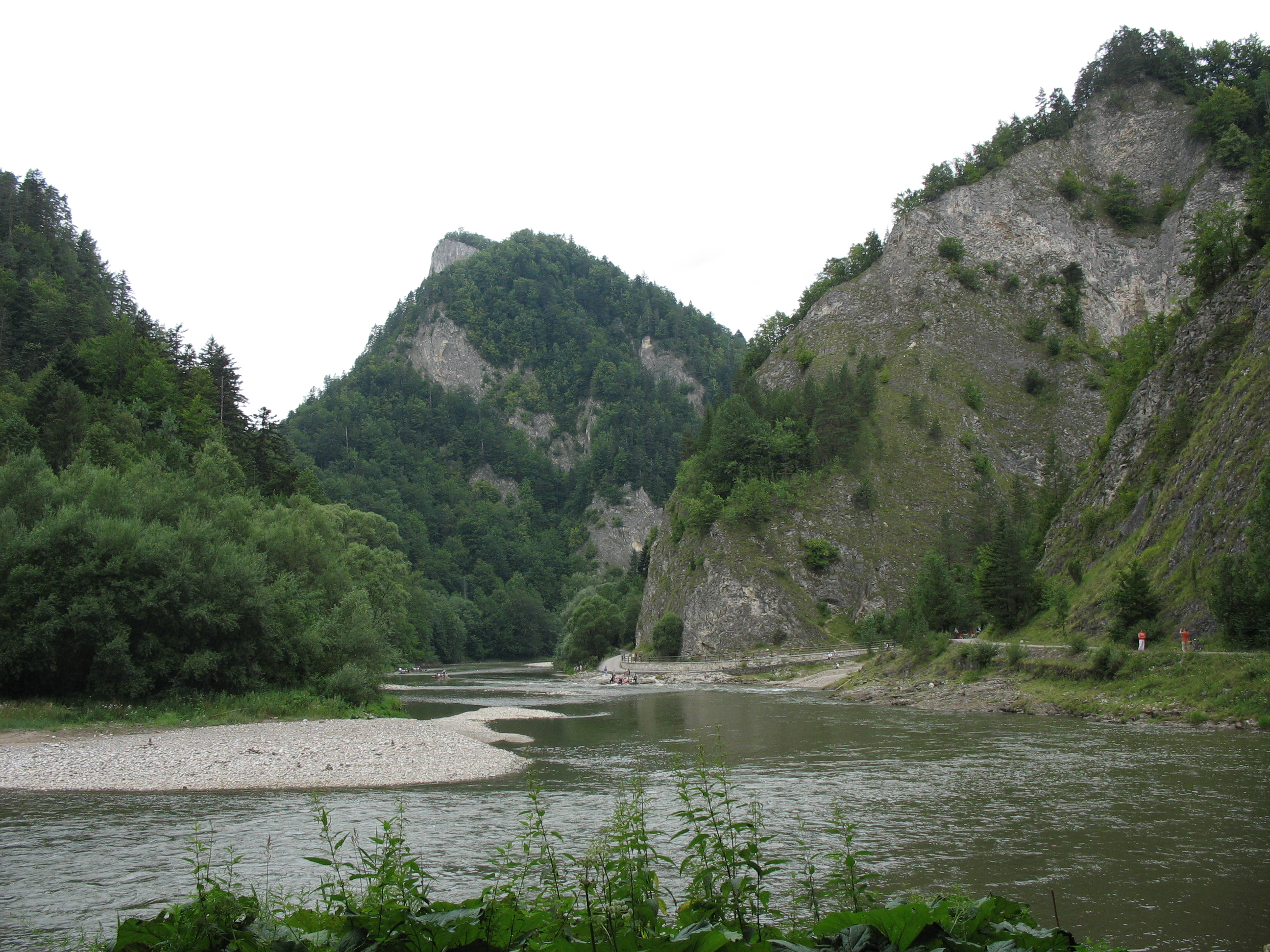 Droga Pienińska - Widok na Dunajec, Sokolicę i ujście Leśnego Potoku